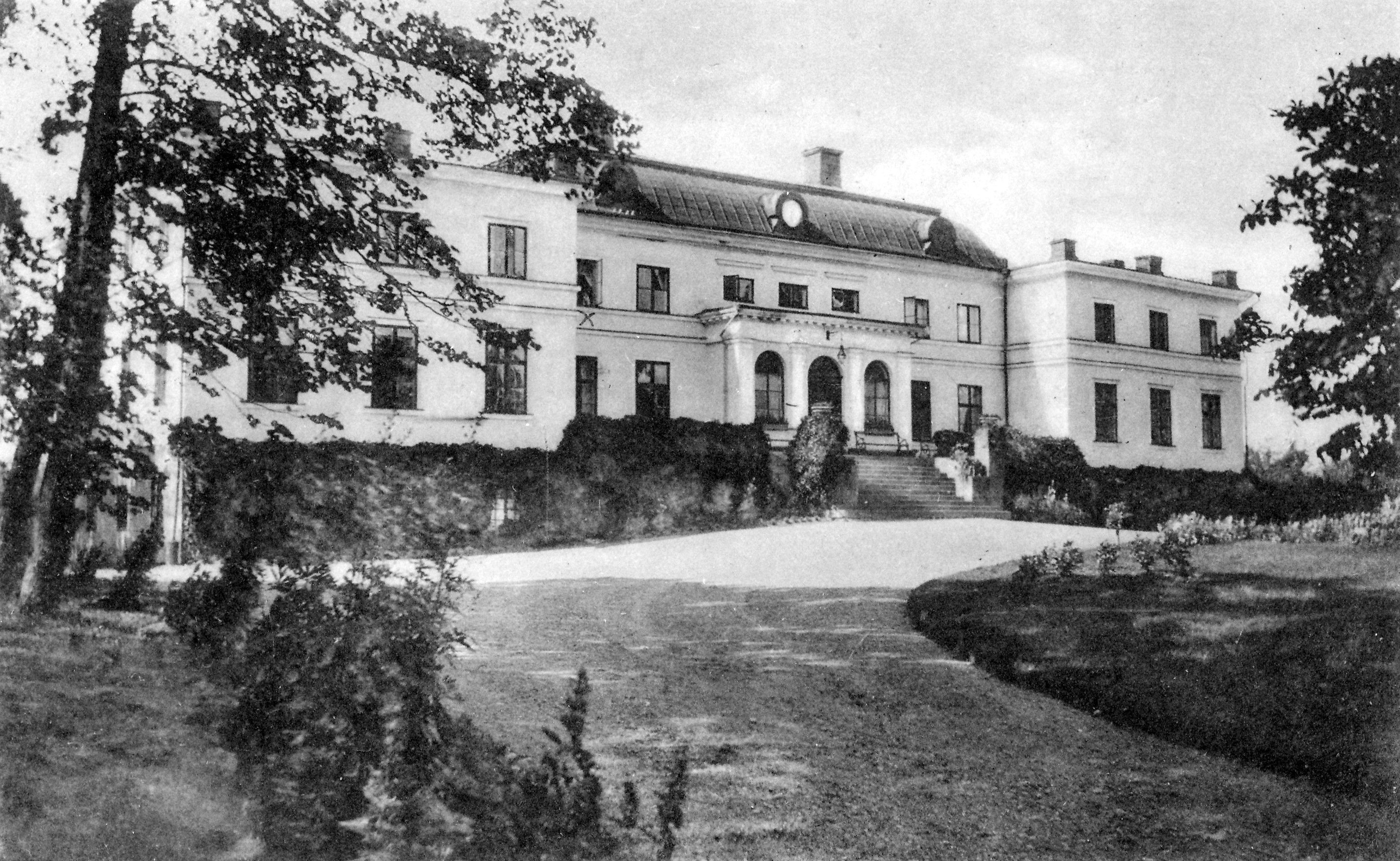 Yxe herrgård